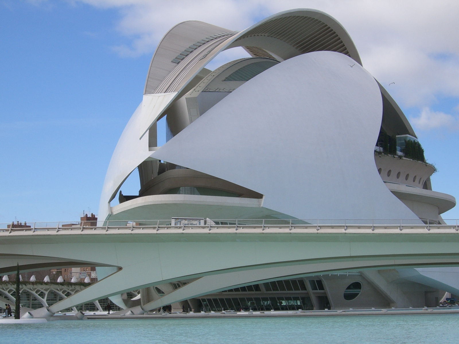 "Ciudad de las Artes y de las Ciencias" (Градът на изкуството и науките), Валенсия, Испания